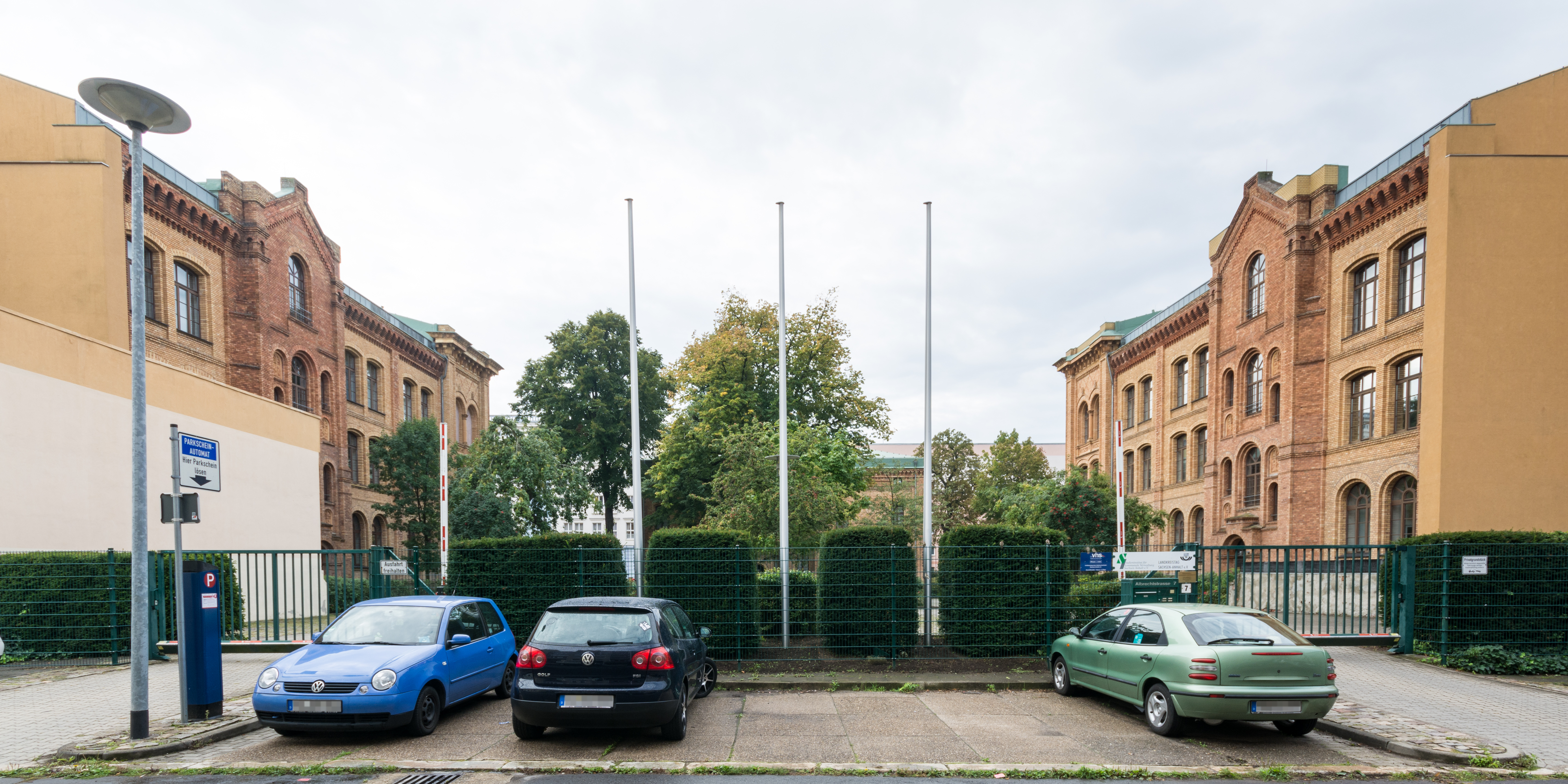 Schulgebäude Albrechtstraße 7 in Magdeburg-Altstadt, Blick von der Albrechtstraße. This is a photograph of an architectural monument.It is on the list of cultural monuments of Magdeburg